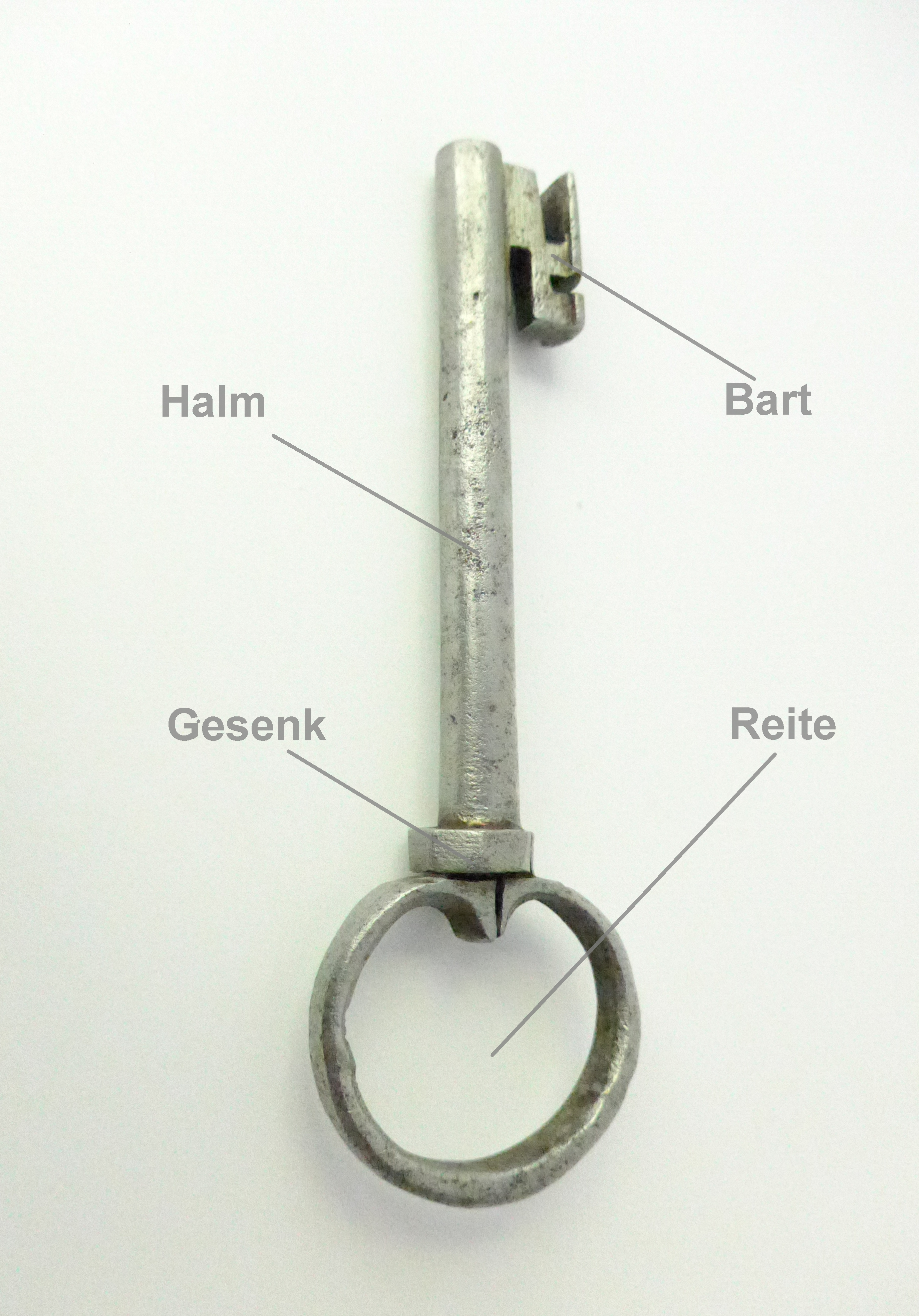 Die Benennung der Bestandteile eines historischen Schhlüssels